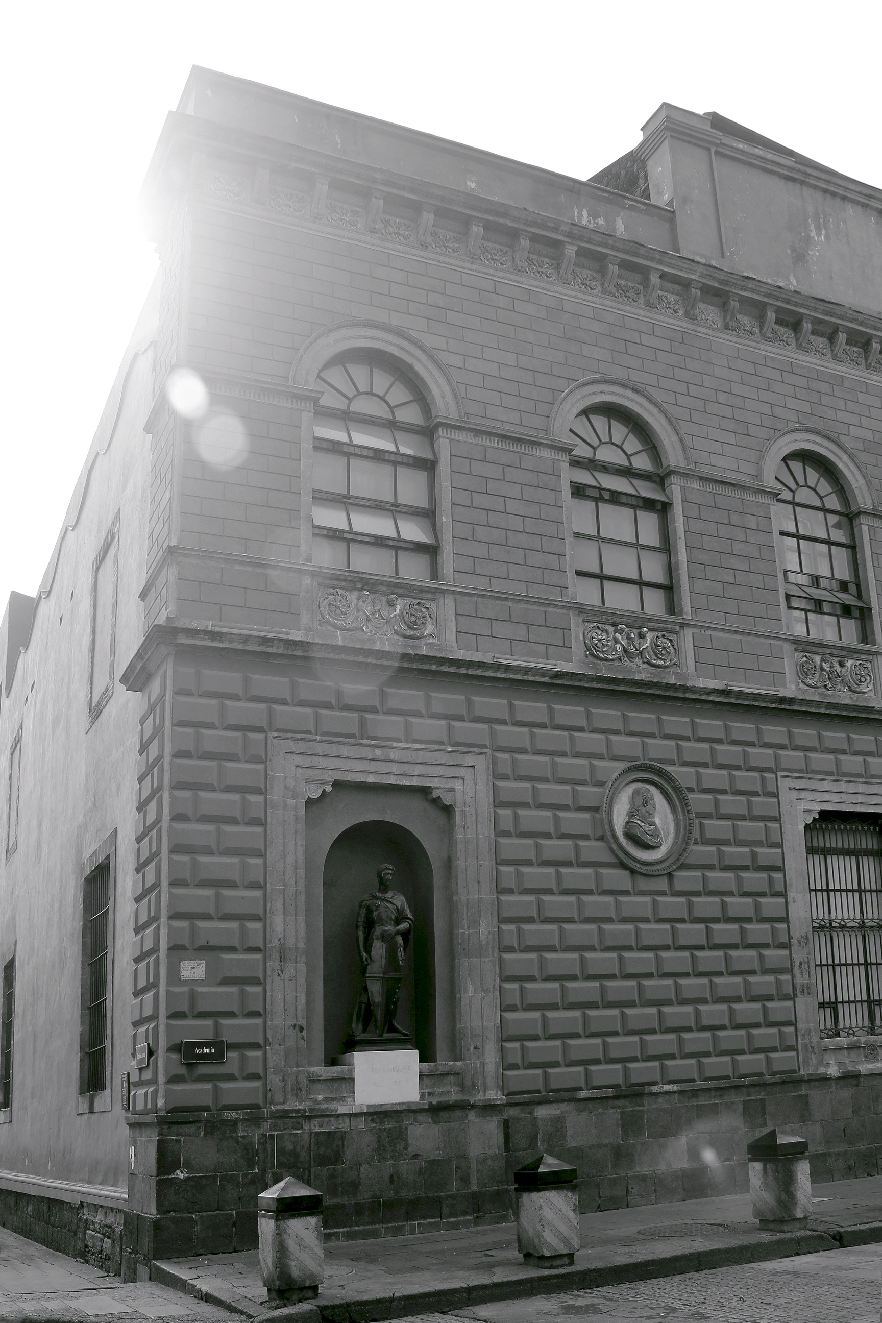 Academia de San Carlos, calle Academia N. 22, Centro Histórico de la Ciudad de México.